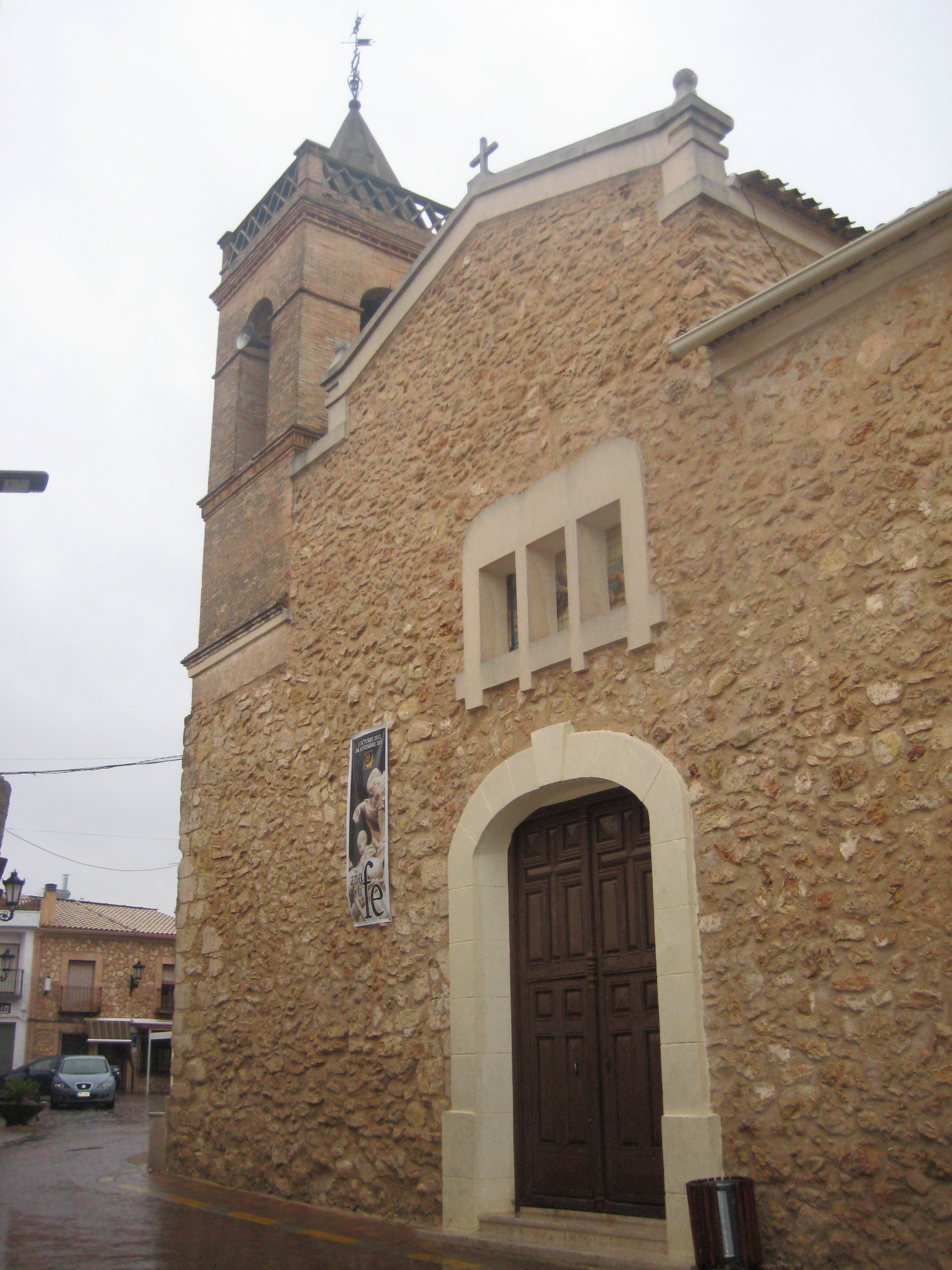 Esta es la Iglesia de La Purisima Concepción.